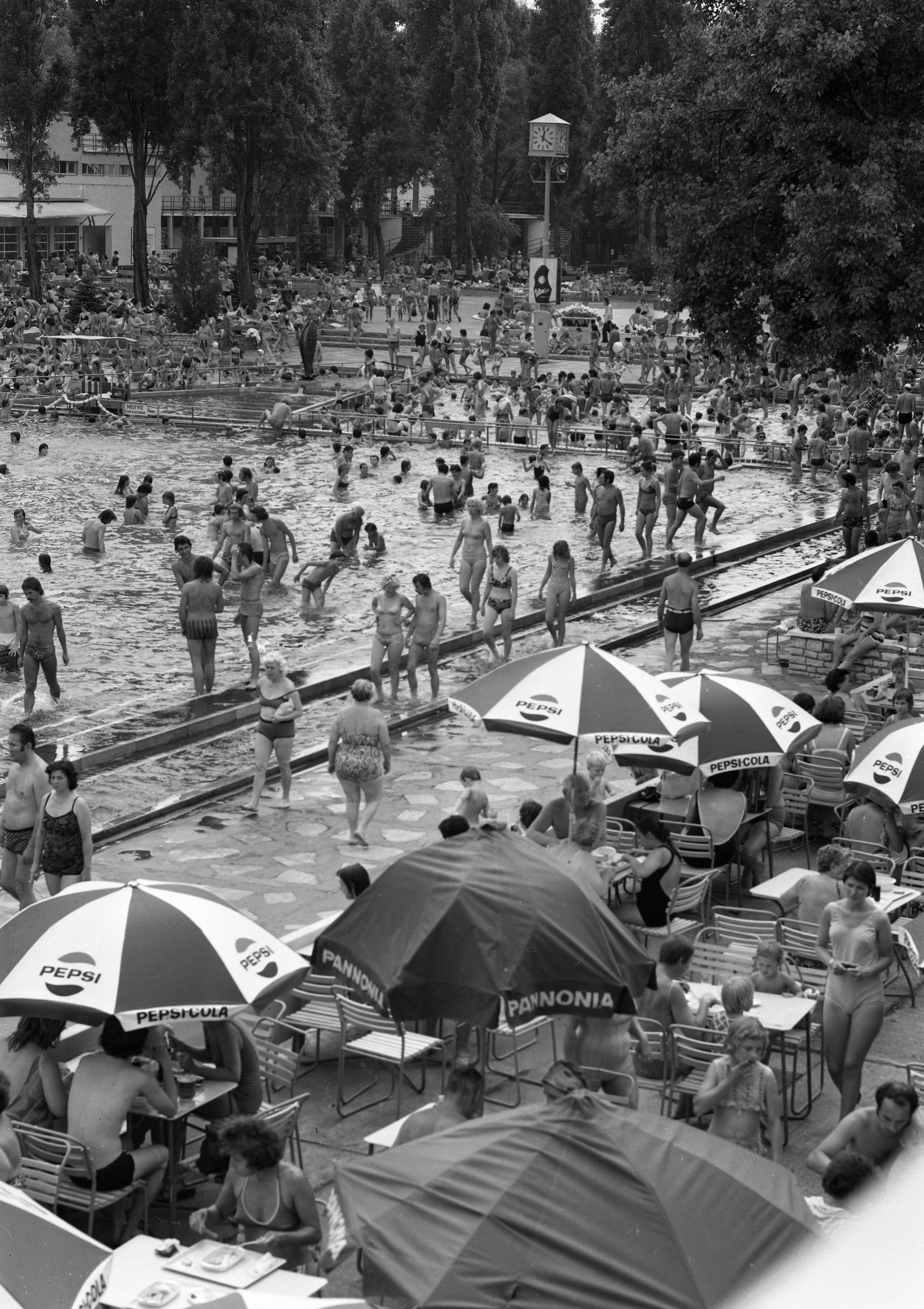 Palatinus Strandfürdő. Location: Hungary, Budapest, Margit Islands Tags: beach Title: Palatinus Strandfürdő.